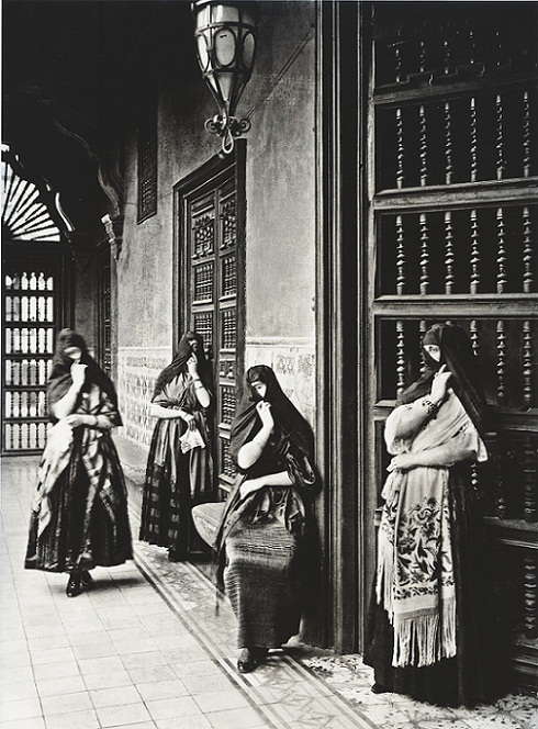 Tapadas Limeñas foto de Eugenio Courret